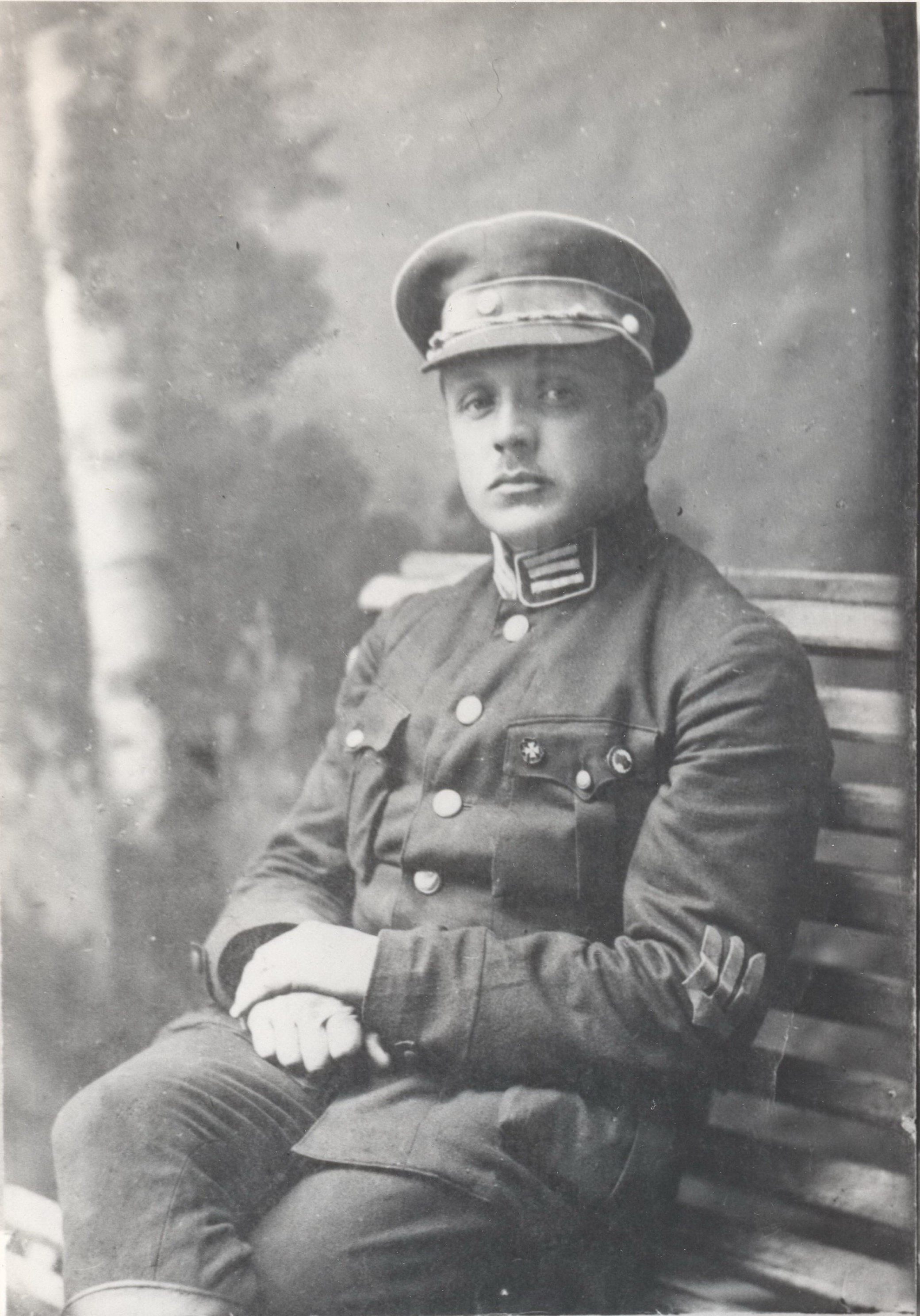 Олександр Удовиченко - Генерал-полковник Армії УНР.